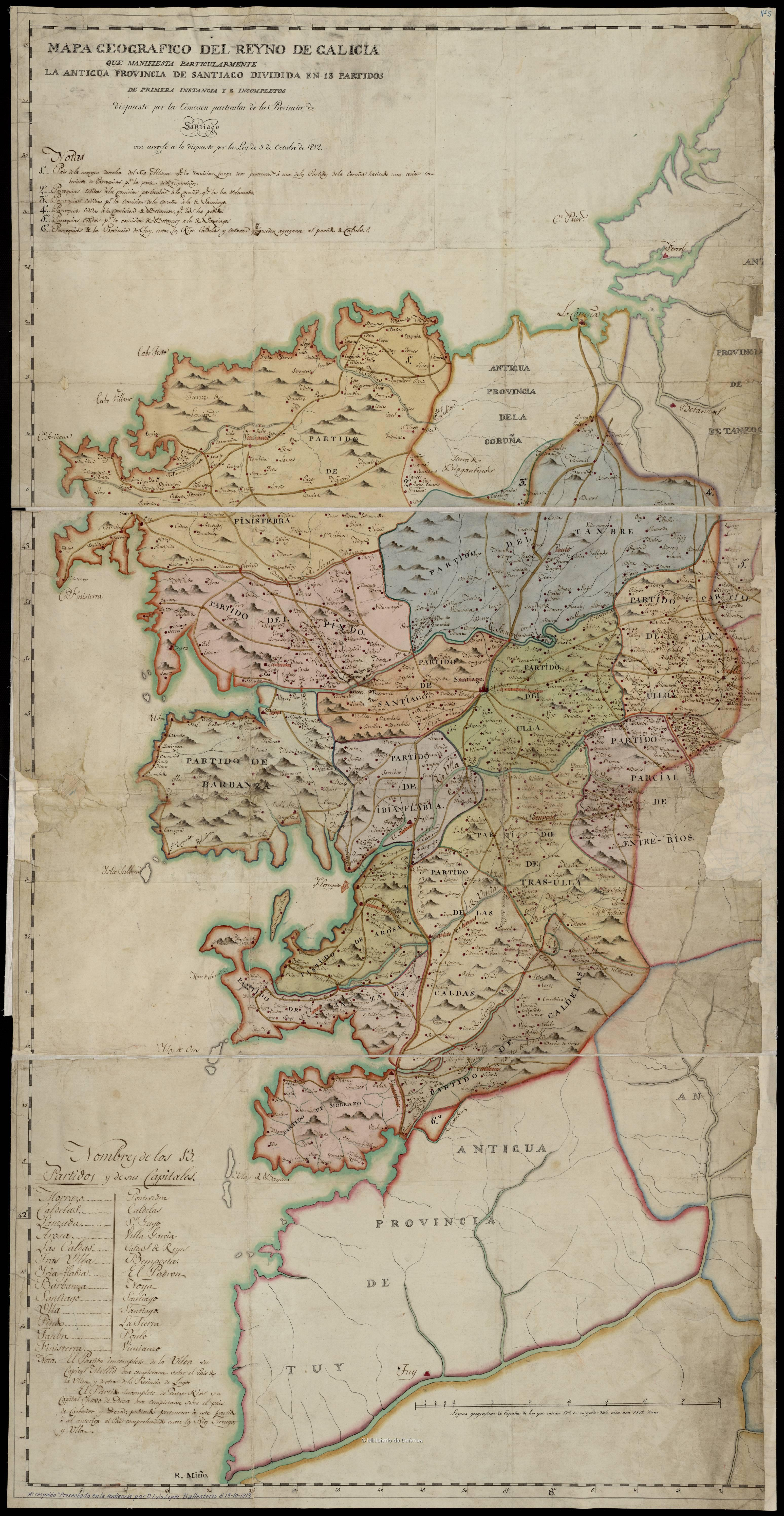 Mapa da provincia de Santiago (Reino de Galicia) no que aparece a proposta da comisión particular desa provincia a respecto do proxecto de división en partidos xudiciais de 1813, establecido no marco lexislativo derivado da implantación da constitución española de 1812. Presentado por Luis López Ballesteros ante a Audiencia de Galicia o 13 de outubro de 1813.